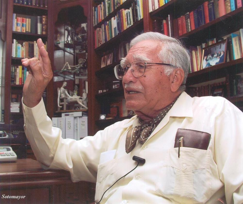 Emilio Herrera, Poeta, Escritor y entregado al servicio social en la ciudad de Torreon, Coahuila, Mexico